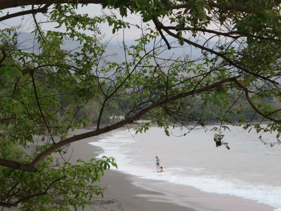 Liquiçá